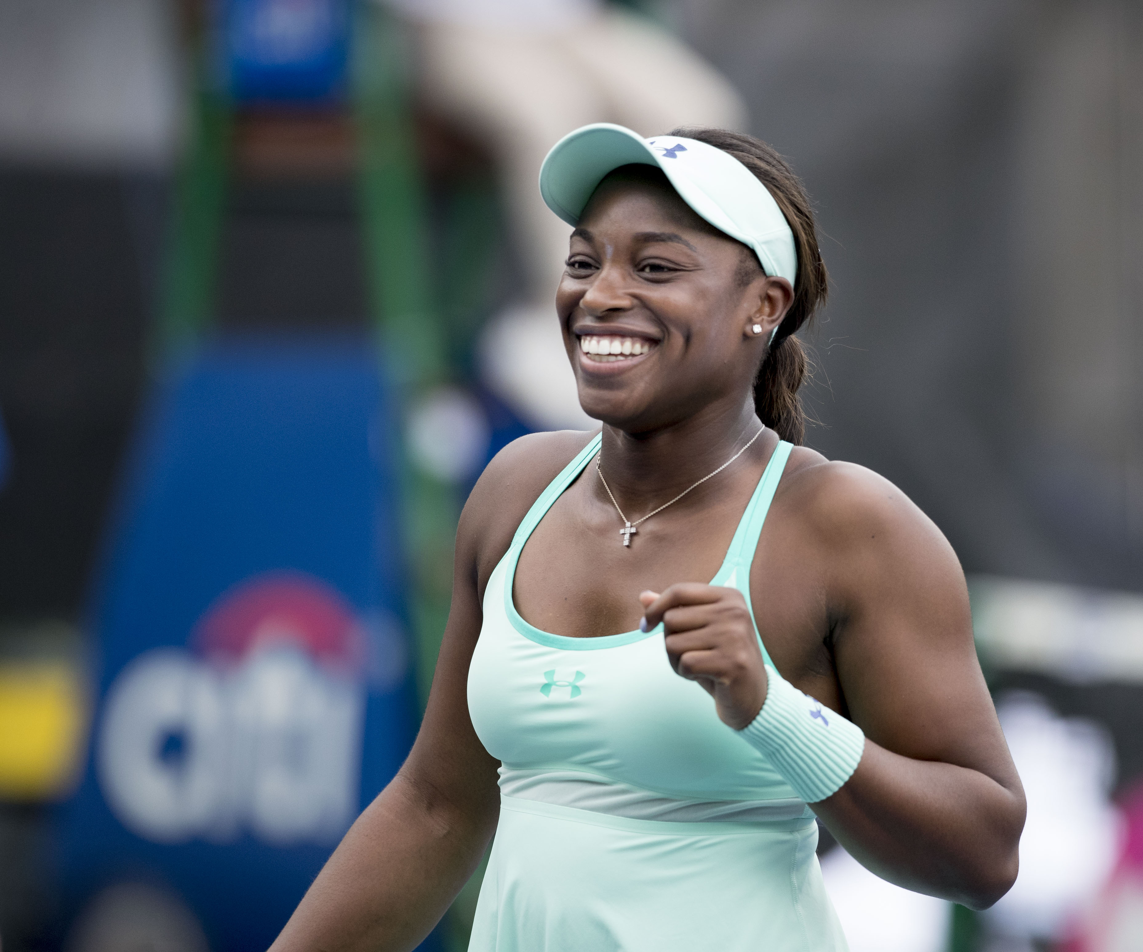 Citi Open Tennis 2017